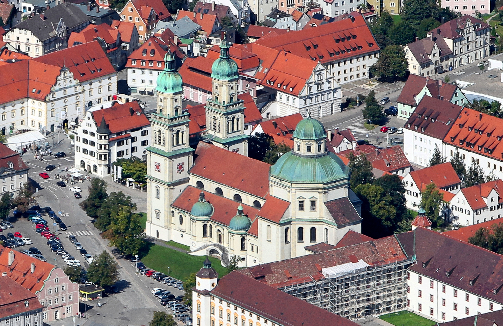 Basilika St. Lorenz in Kempten (Allgäu)